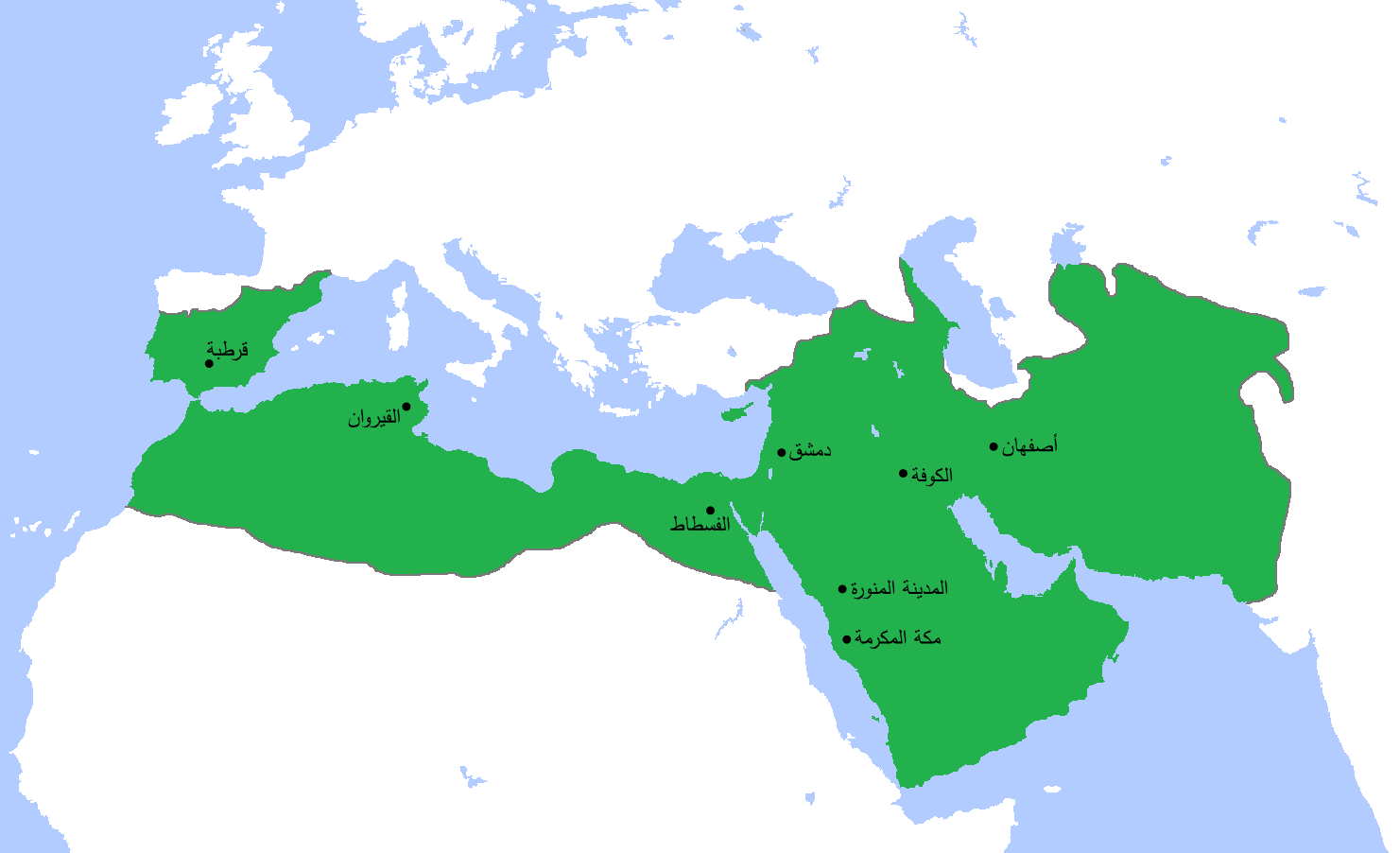 خارطة تُظهر المساحة التي امتدَّت عليها الدولة الأُمويَّة في أقصى اتساعها وذُروة قوَّتها، حوالي سنة 750م. (الرسم مبني بشكلٍ جُزئيّ على كتاب "أطلس تاريخ العالم" (2007) - العالم ما بين سنتيّ 500 و750م، الخارطة.)